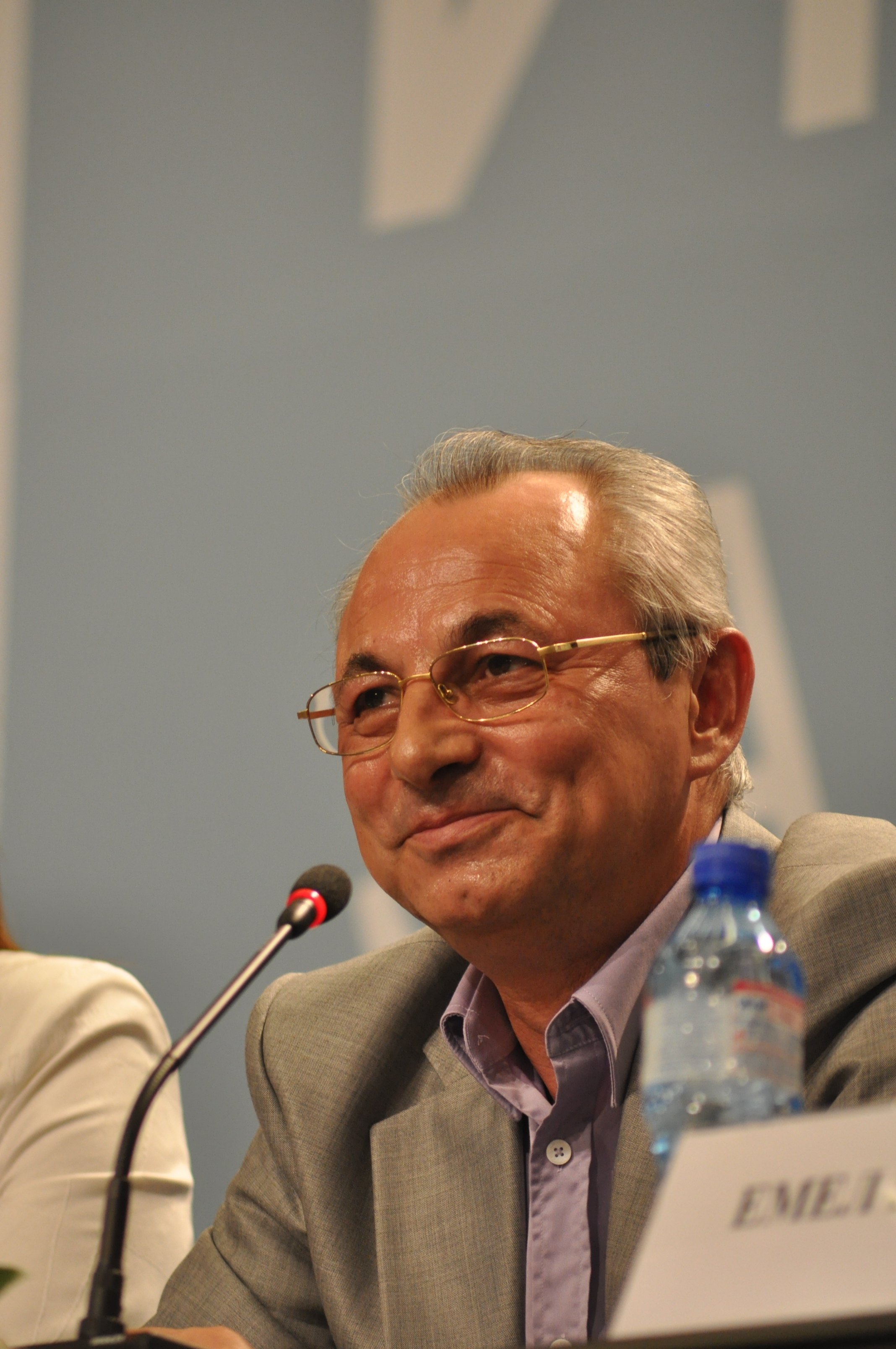 Ахмед Доган по време на пресконференция след парламентарните избори през 2009 година